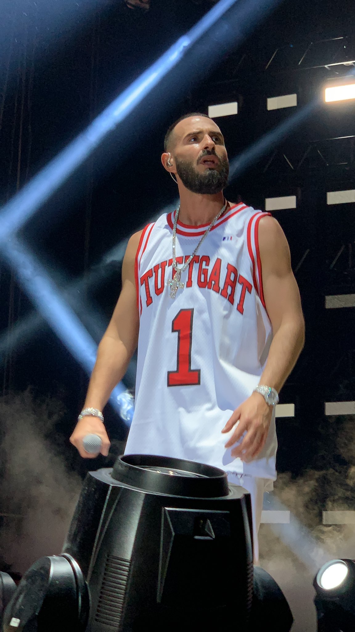 Shindy Konzertauftritt (2020)